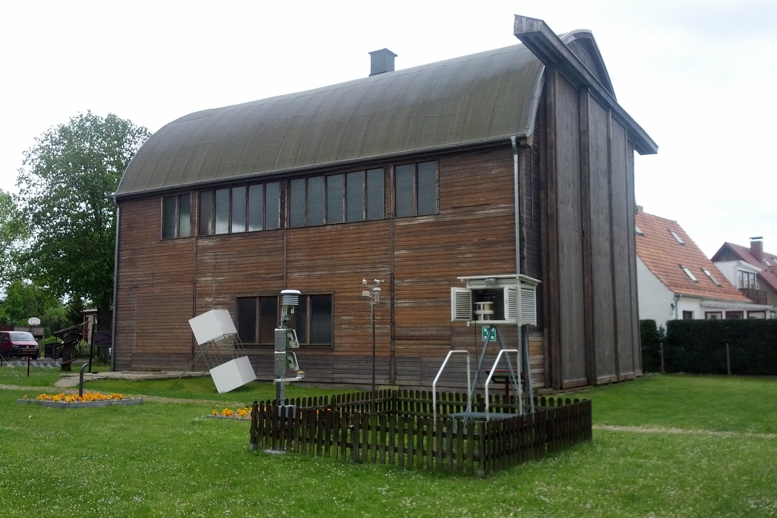 Wettermuseum Lindenberg - Ballonhalle 2 und Thermometerhütte